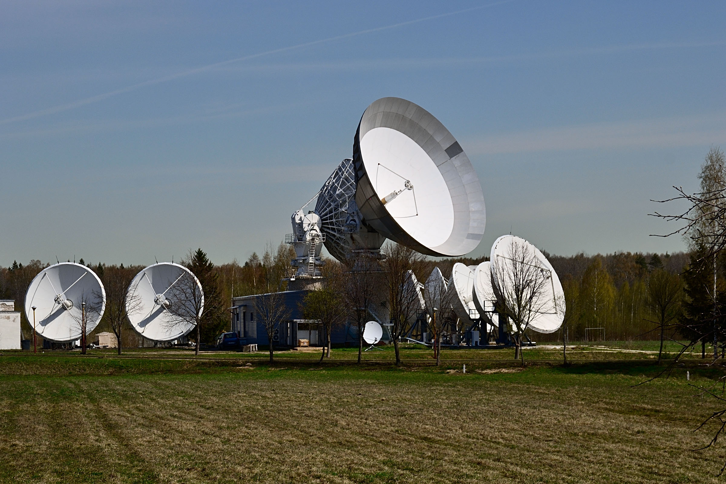 ЦКС Дубна